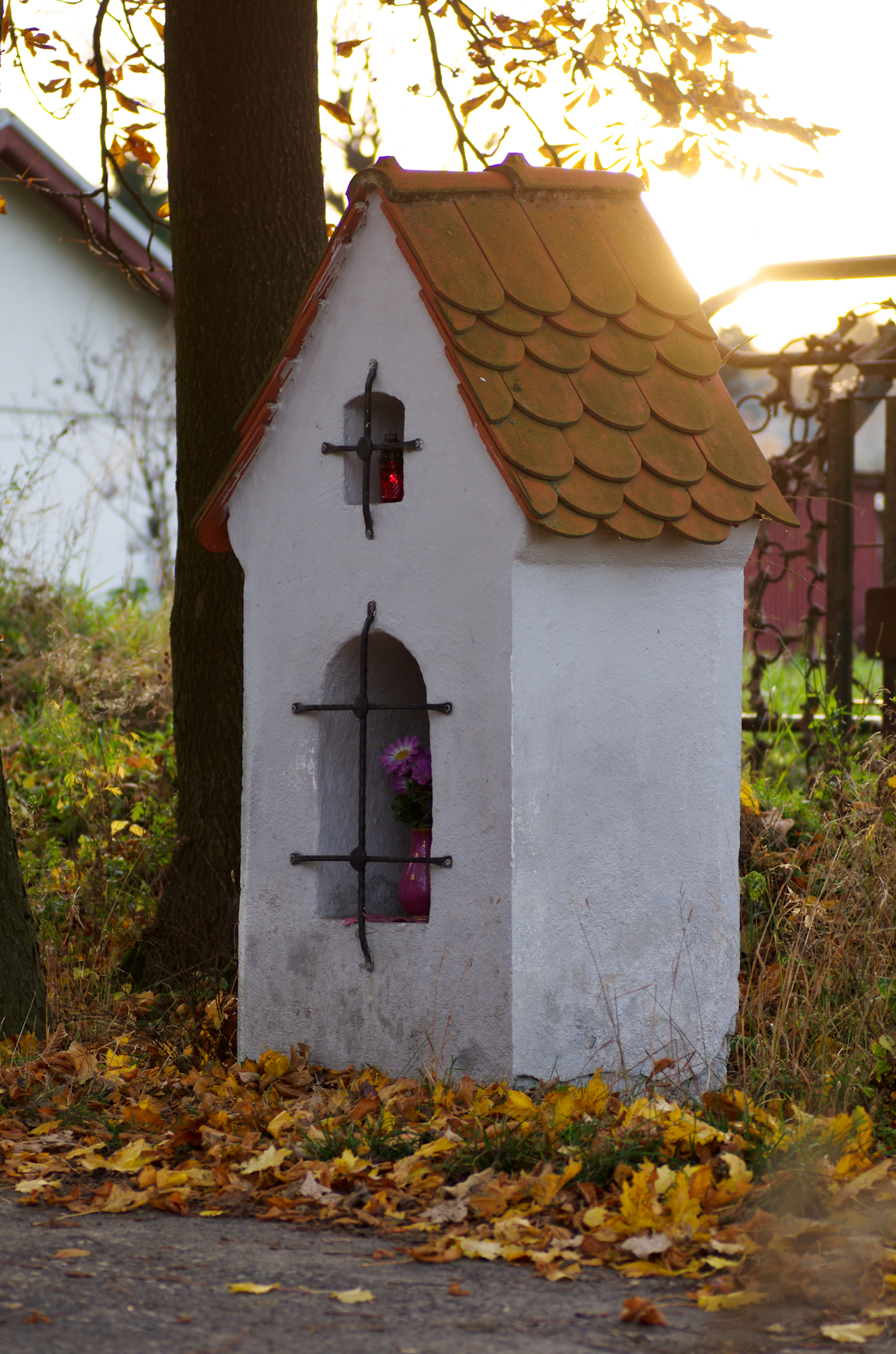 Nadlesí, Slavkovský les, okres Sokolov, kaplička na konci obce